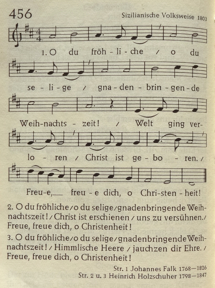 Verlag der Evangelischen Kirche in Hessen und Nassau: Der Herr ist mein Hirte, Gesangbuch, Evangelisches Kirchengesangbuch für die Evangelische Kirche in Hessen und Nassau, 17. Auflage, Herausgegeben auf Beschluß der Ersten Kirchensynode der Evangelischen Kirche in Hessen und Nassau vom 14. April 1950, Darmstadt, 1962, Liederanhang zum Evangelischen Kirchengesangbuch für die Evangelische Kirchen Hessens, 456. Oh du fröhliche, Sizilianische Volksweise 1803, Str. 1 Johannes Falk 1768-1826, Str. 2 u. 3 Heinrich Holzschuber 1798-1847, 457. O Gott, o Geist, o Licht des Lebens, Weise: Mein Jesu, der du vor dem Scheiden (wie Nr. 430), Christian Gregor 1784, Gerhard Tersteegen 1697-1769